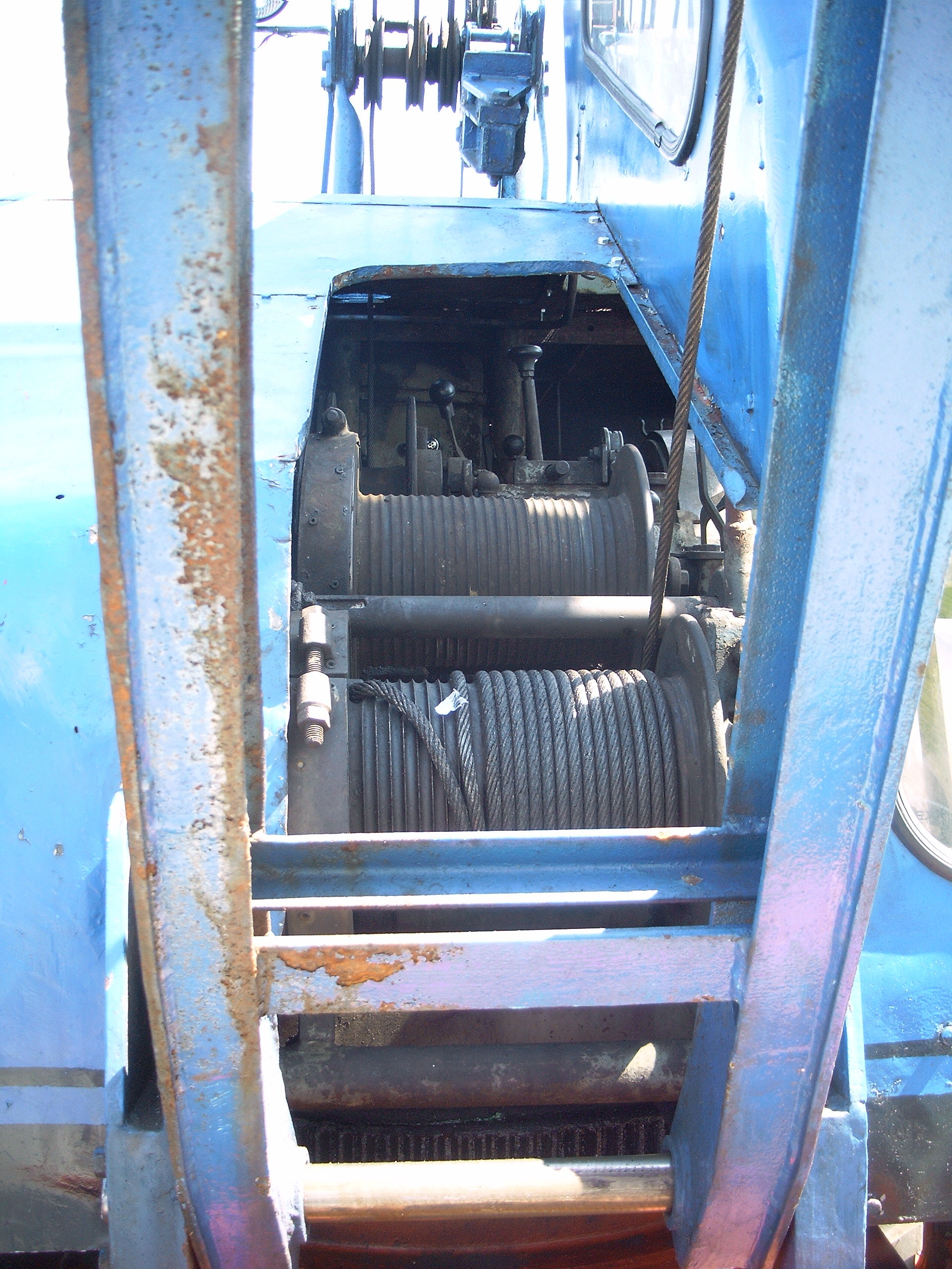 Fuchs 301 Bagger beim 50. Jubiläum des Herstellers in Bad Schönborn